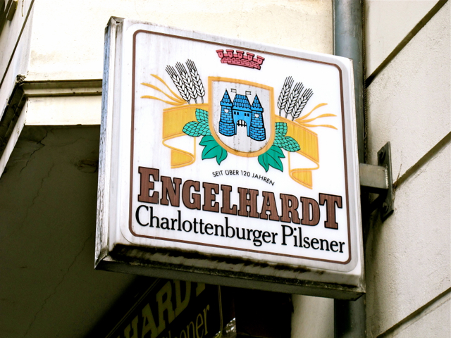 Skylt för Engelhardt Charlottenburger Pilsner, Berlin-Neukölln 2012